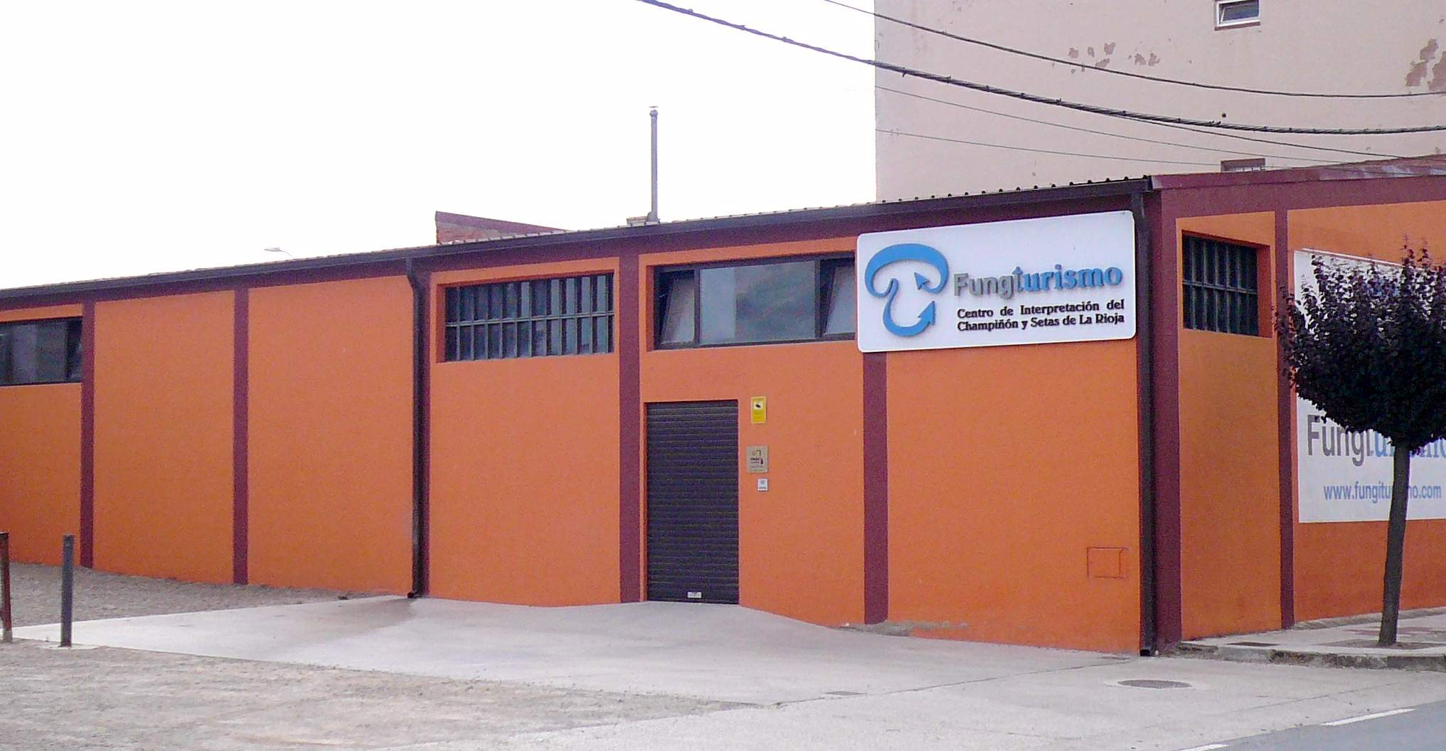 Centro de Interpretacion del Champiñón y Setas de la Rioja (Fungiturismo), en Pradejón (La Rioja)